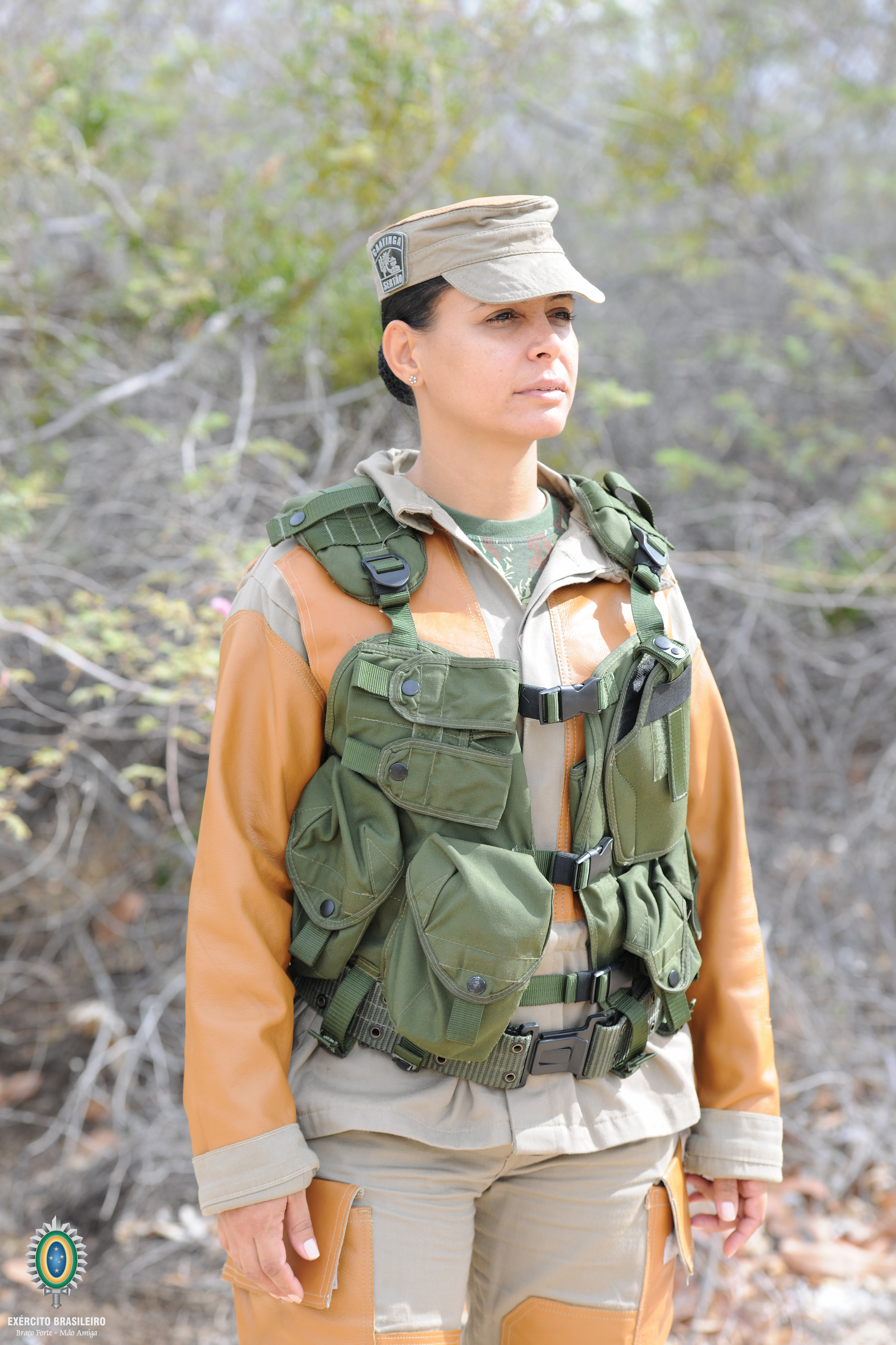 Foto: Ten Edvaldo/EB